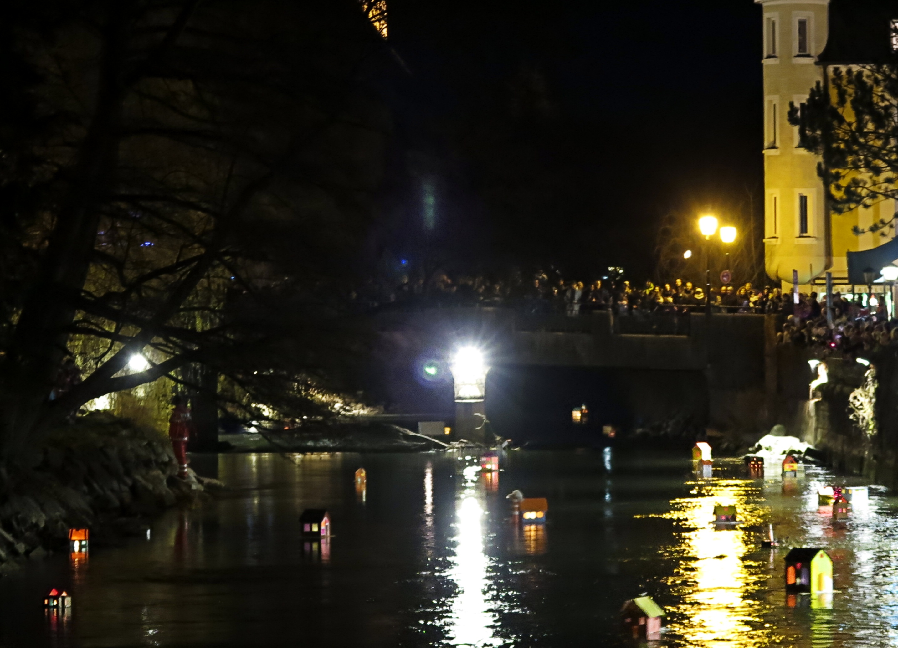 Deutschland, Bayern, Oberbayern, Landkreis Fürstenfeldbruck, die von Kindern gebastelten Lucienhäuschen werden am 13. Dezember nach Einbruch der Dunkelheit mit brennenden Kerzen in die Amper gesetzt, im Hintergrund die Amperbrücke.